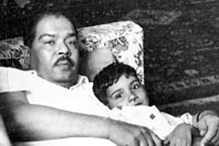 Salah Nasr and son